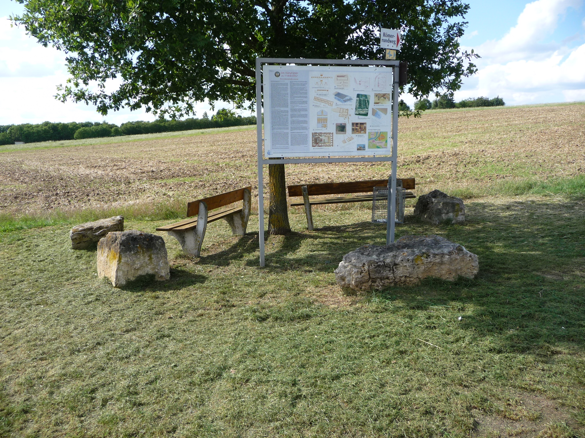 Römerlager Marktbreit